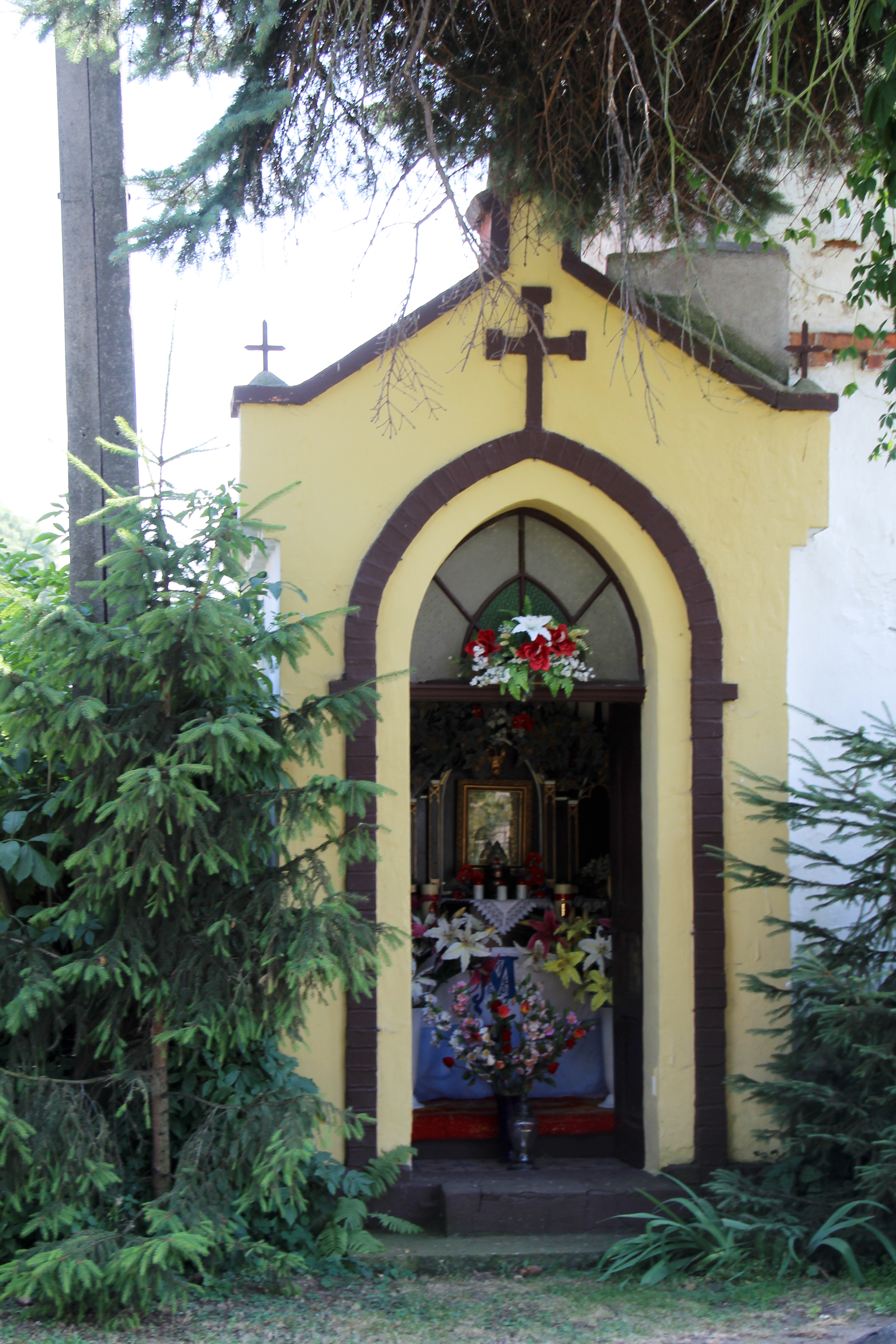 Trzeboszowice – wieś w Polsce, w województwie opolskim, w powiecie nyskim, w gminie Paczków.